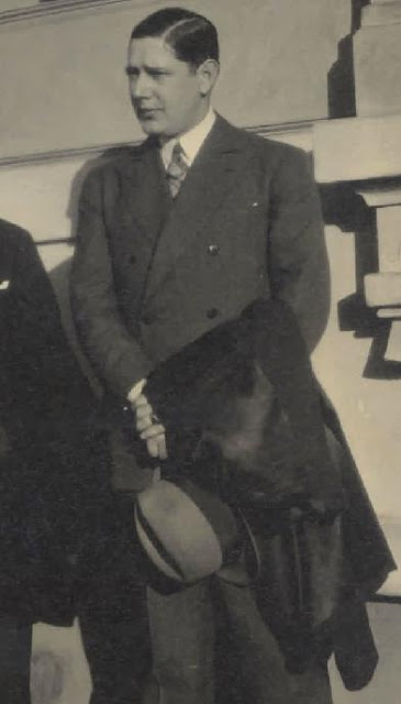 Carlos Alves de Souza Filho, alors secrétaire à l'ambassade du Brésil à Paris (1928)